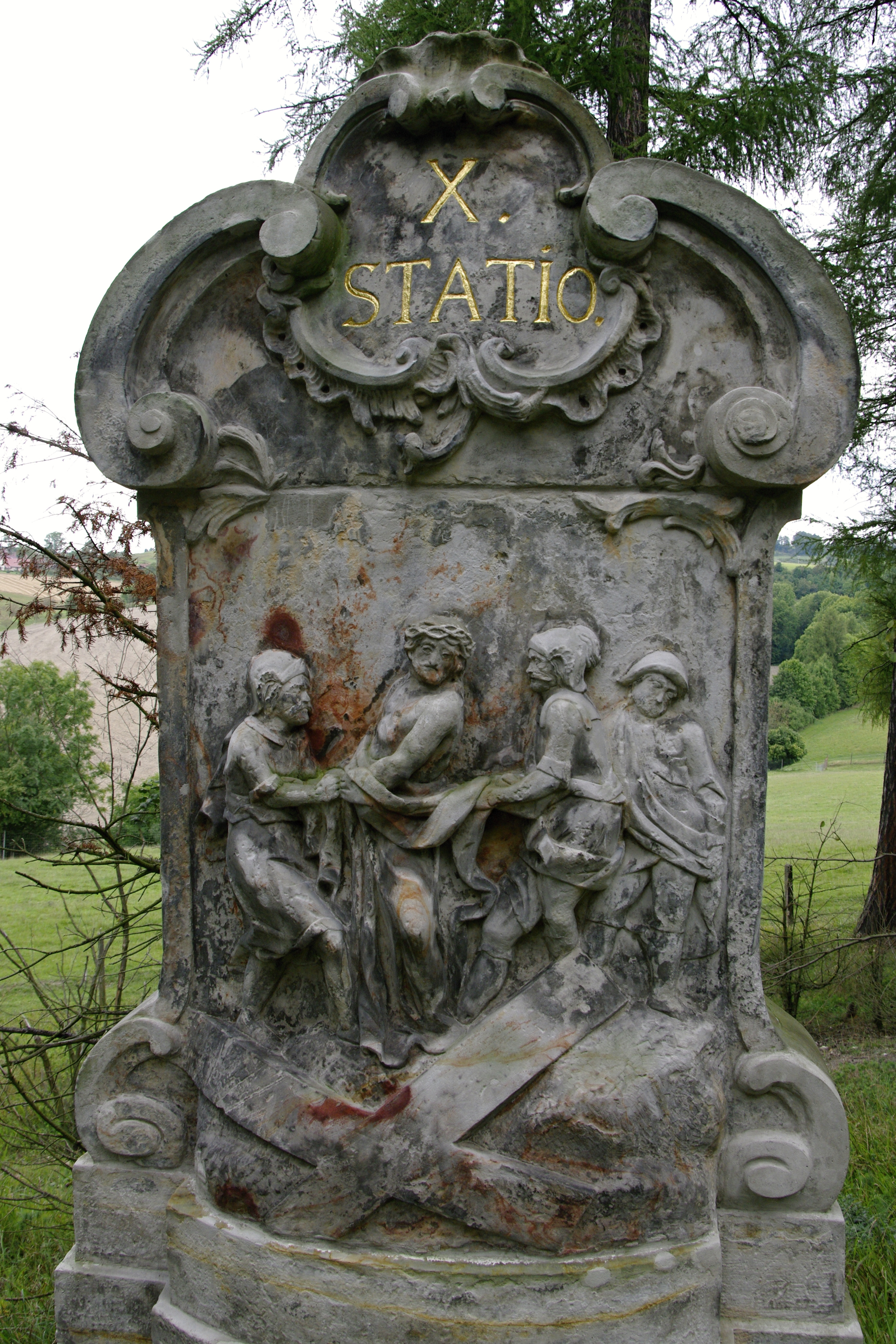 Křížová cesta, od kostela ke zřícenině hradu Boží dům, Nové Hrady (okres Ústí nad Orlicí).